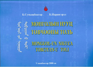 Монгол: Б. Сумъяабаатар, "Монголын нууц товчооны толь", хуудас 875, 2008, ISBN 978-99929-895-7-2 Invalid ISBN